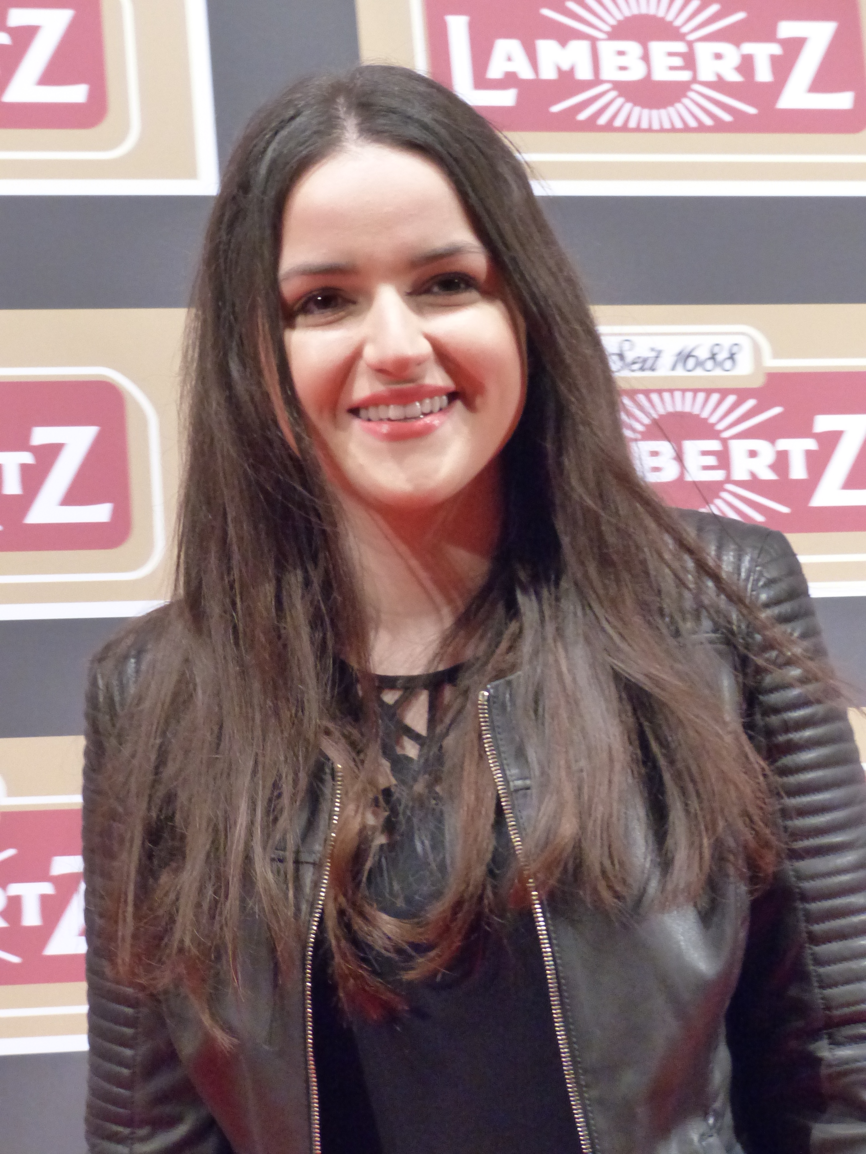 Laura Pinski bei der Lambertz Monday Night, im Februar 2016.